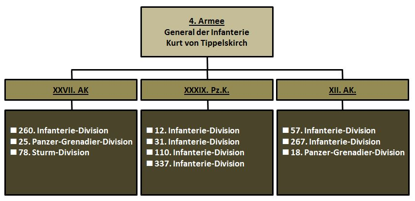 Gliederung der 4. Armee im Juni 1944